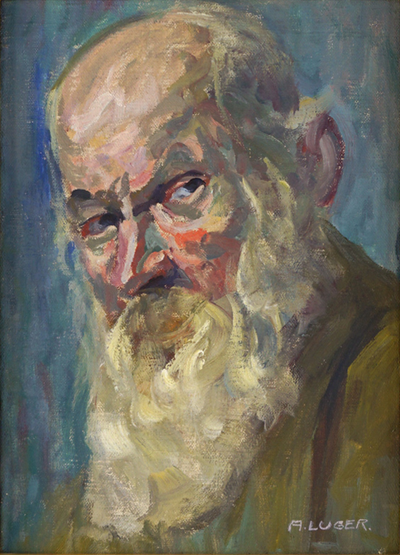 Selbnstporträt